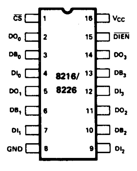 8216/8216 Pinout